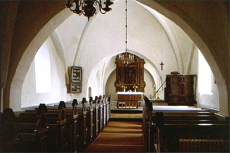 Ejlby Kirke i Danmark. Skib mod øst